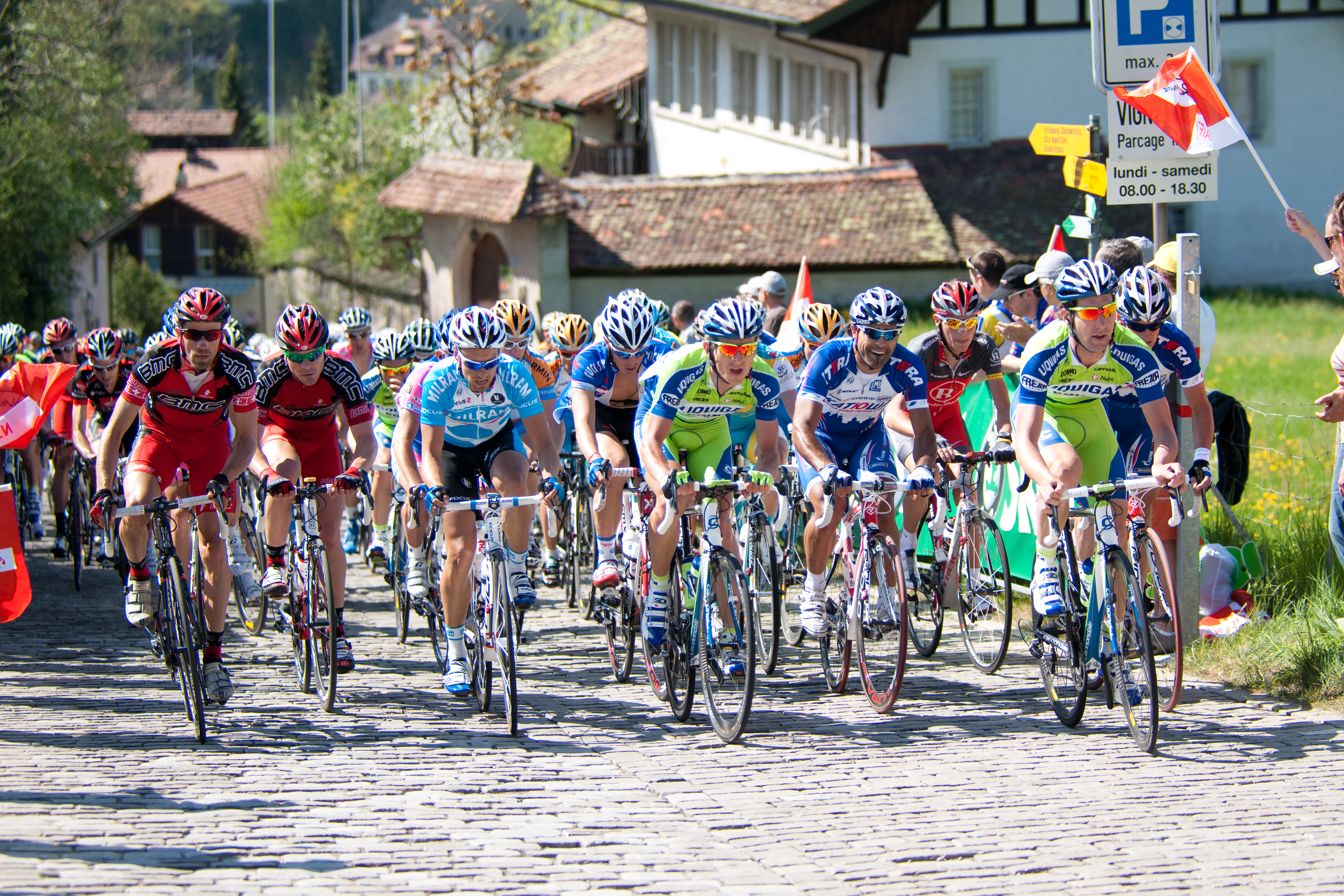 Peloton dans la Lorette, Tour de Romandie 2010.